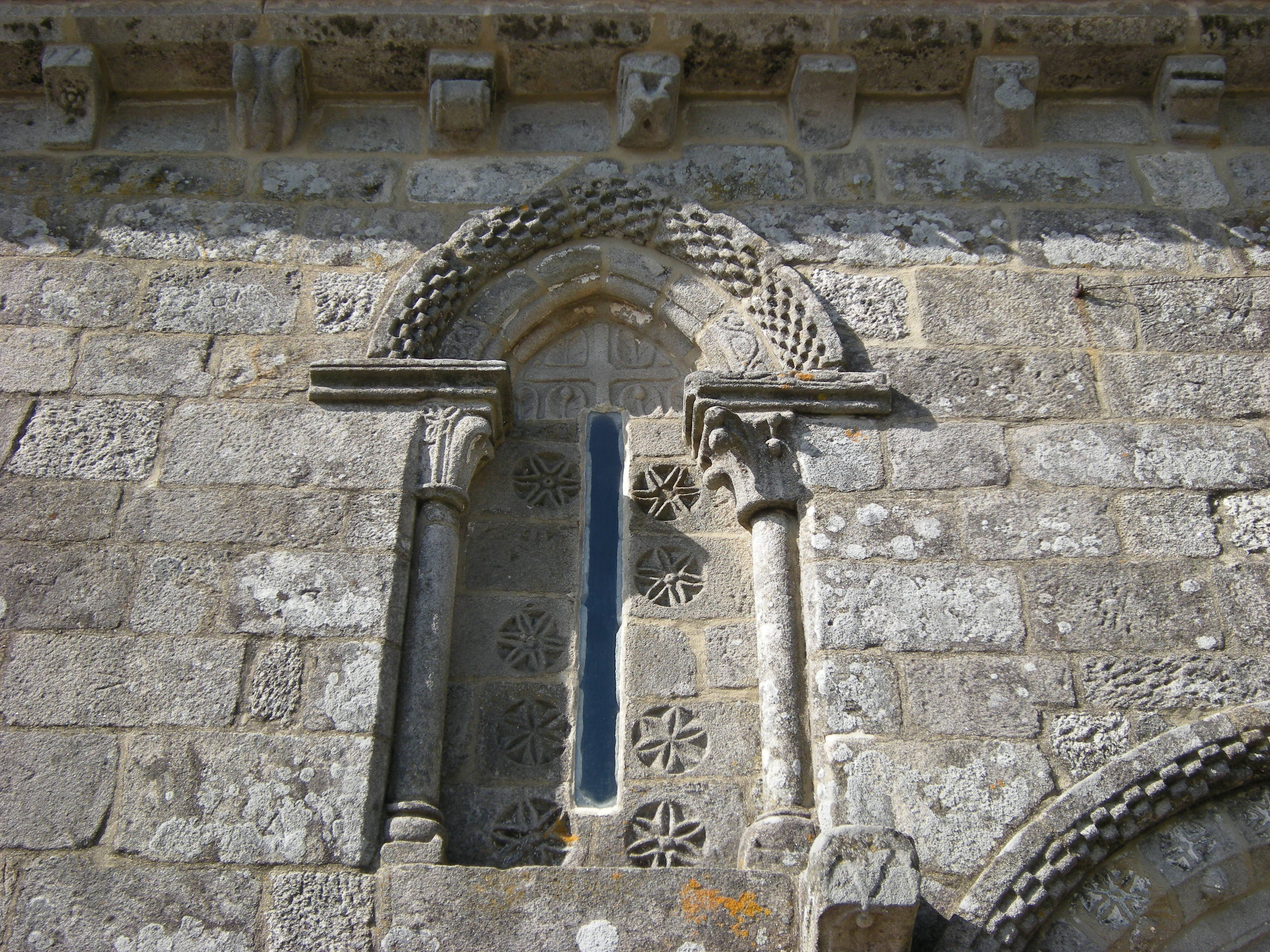 Igrexa de Santa María de Castrelos, Vigo